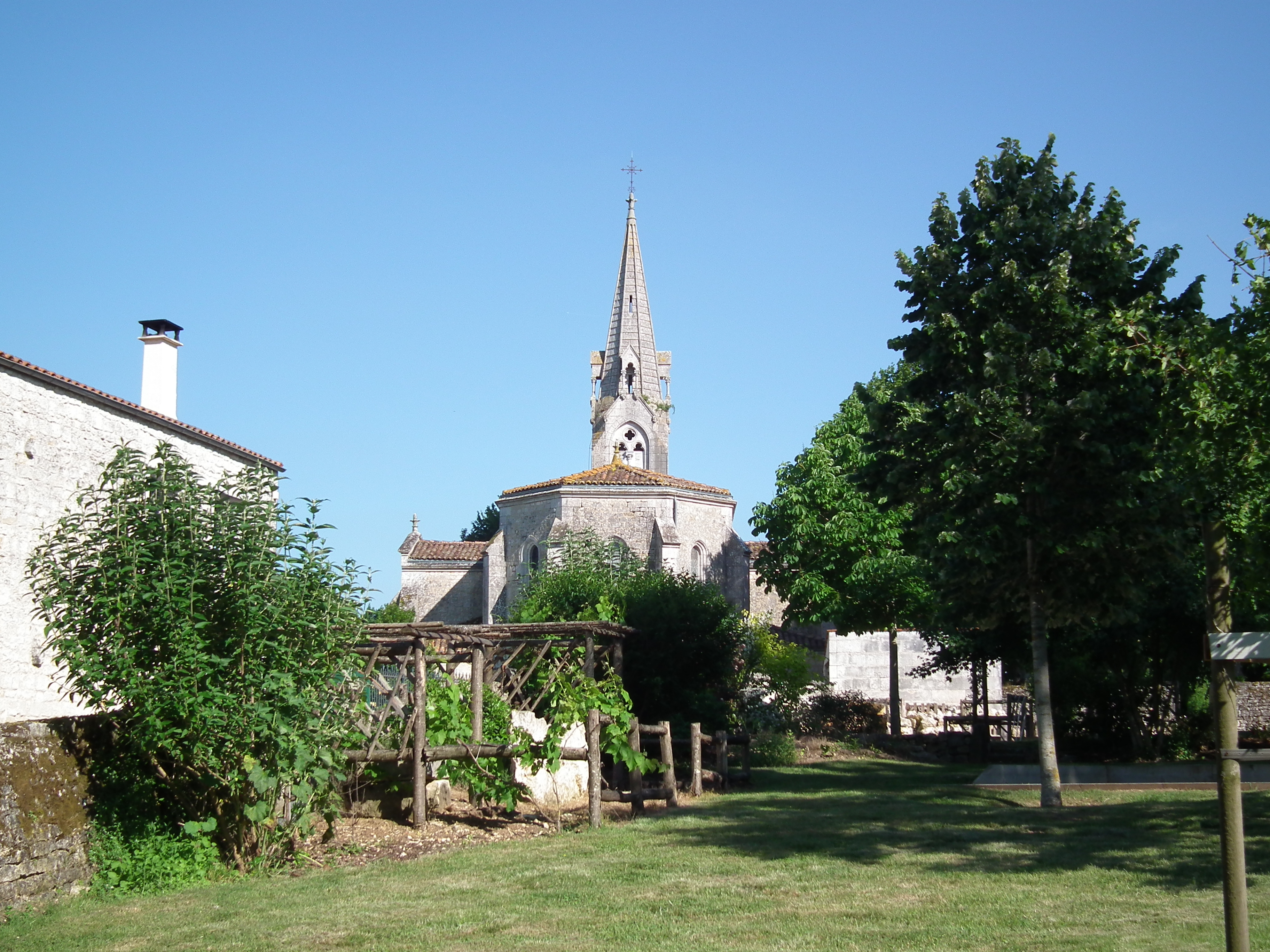 Le centre-bourg de Crazannes